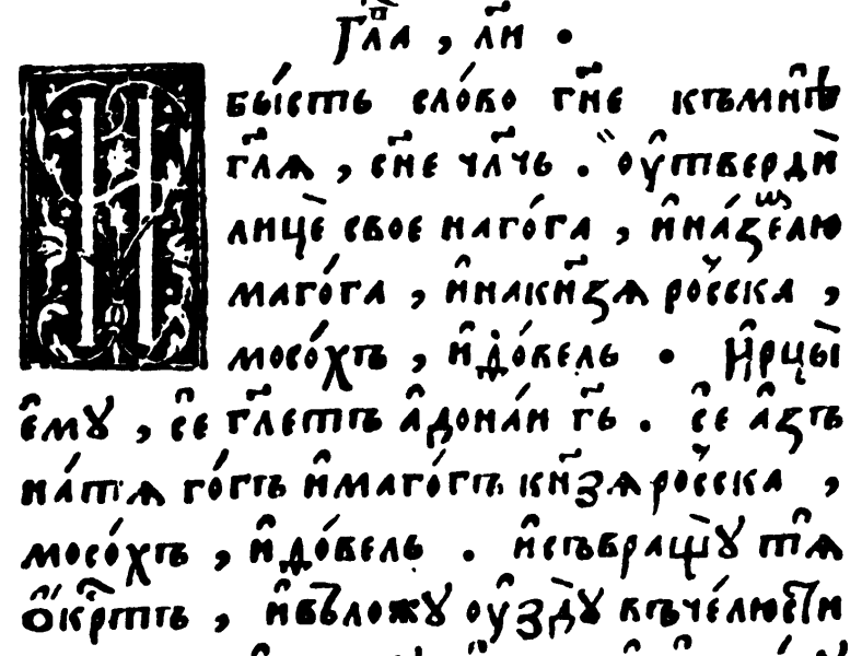 Репринтное переиздание, 1988. Фрагмент 853 листа.